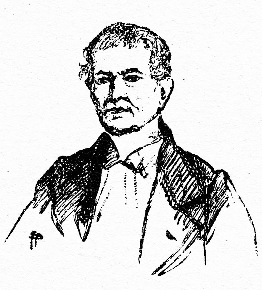 Vincent Chausenque, par Charles Jouas. Vignette de couverture, tome VI de "Cent Ans aux Pyrénées", de Henri Beraldi.